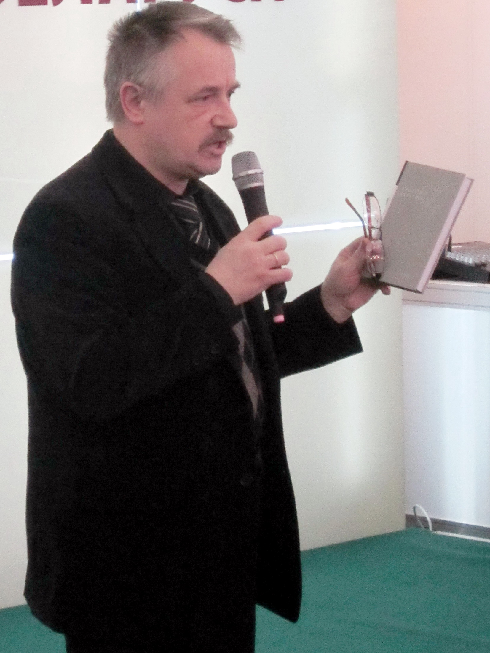 Пісьменнік Віктар Шніп. XX Міжнародная кніжная выстава, Мінск, 10 лютага 2013 г.